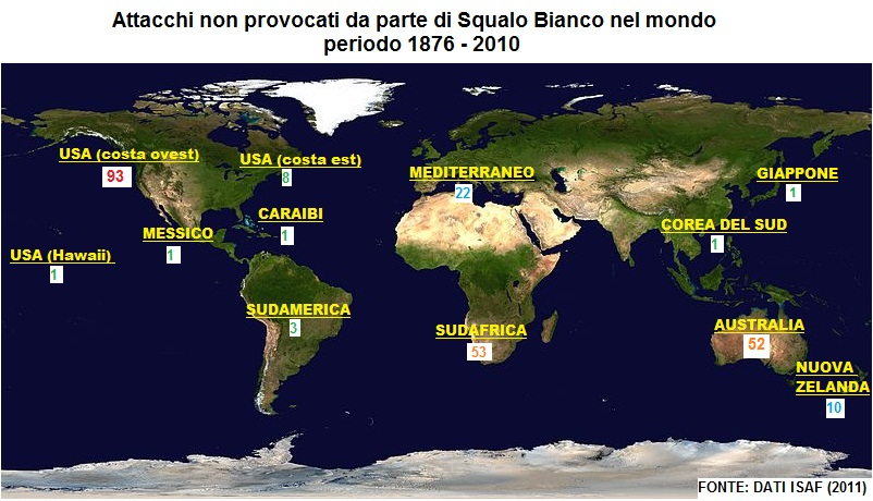 Aree geografiche degli attacchi di Carcharodon carcharias non provocati avvenuti in tutto il mondo tra il 1876 e il 2010. I dati sono tratti dall'International Shark Attack File (ISAF).